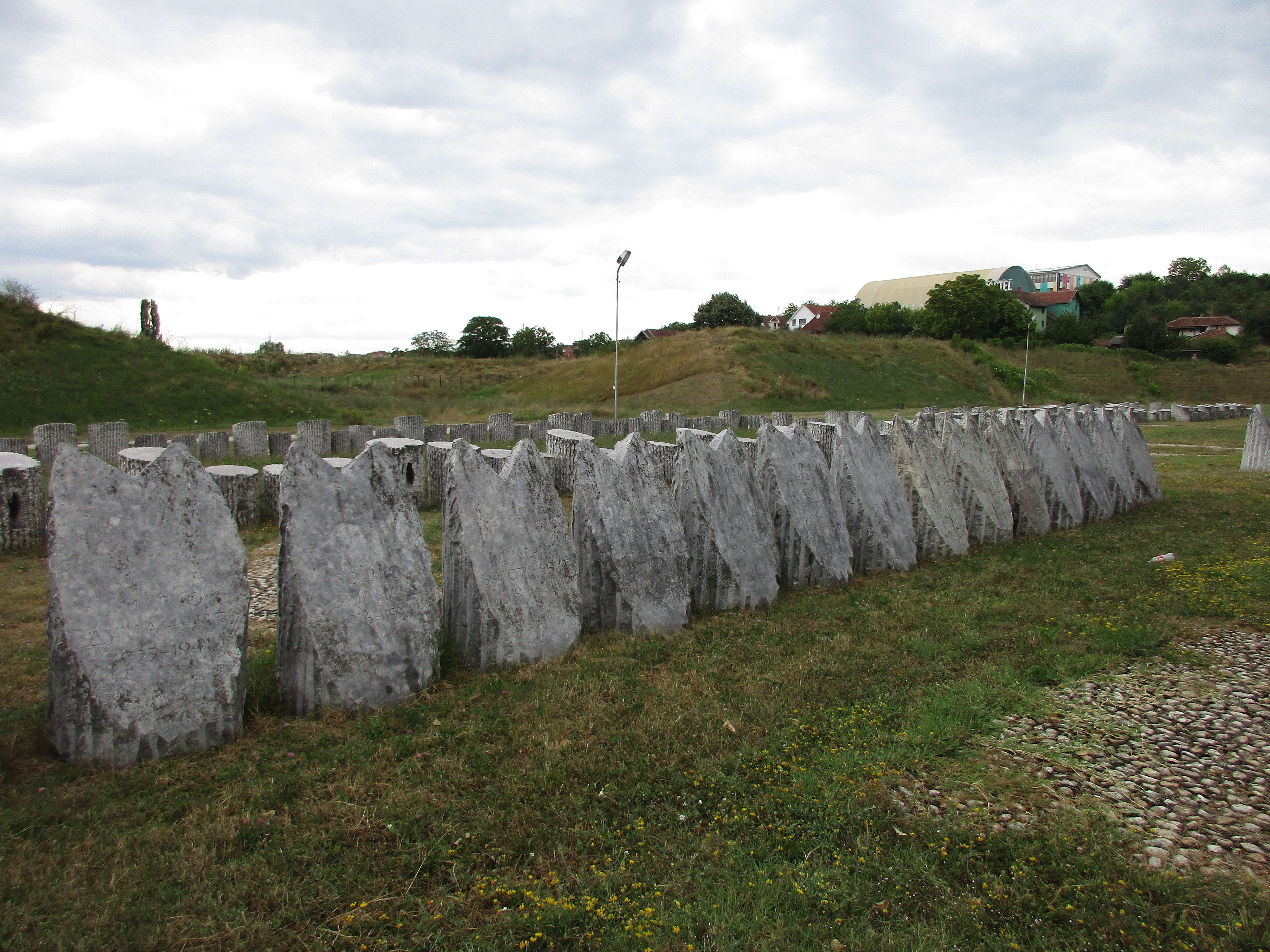 Srpski (latinica): Edu viki kamp 2017, foto tura u Kraljevu